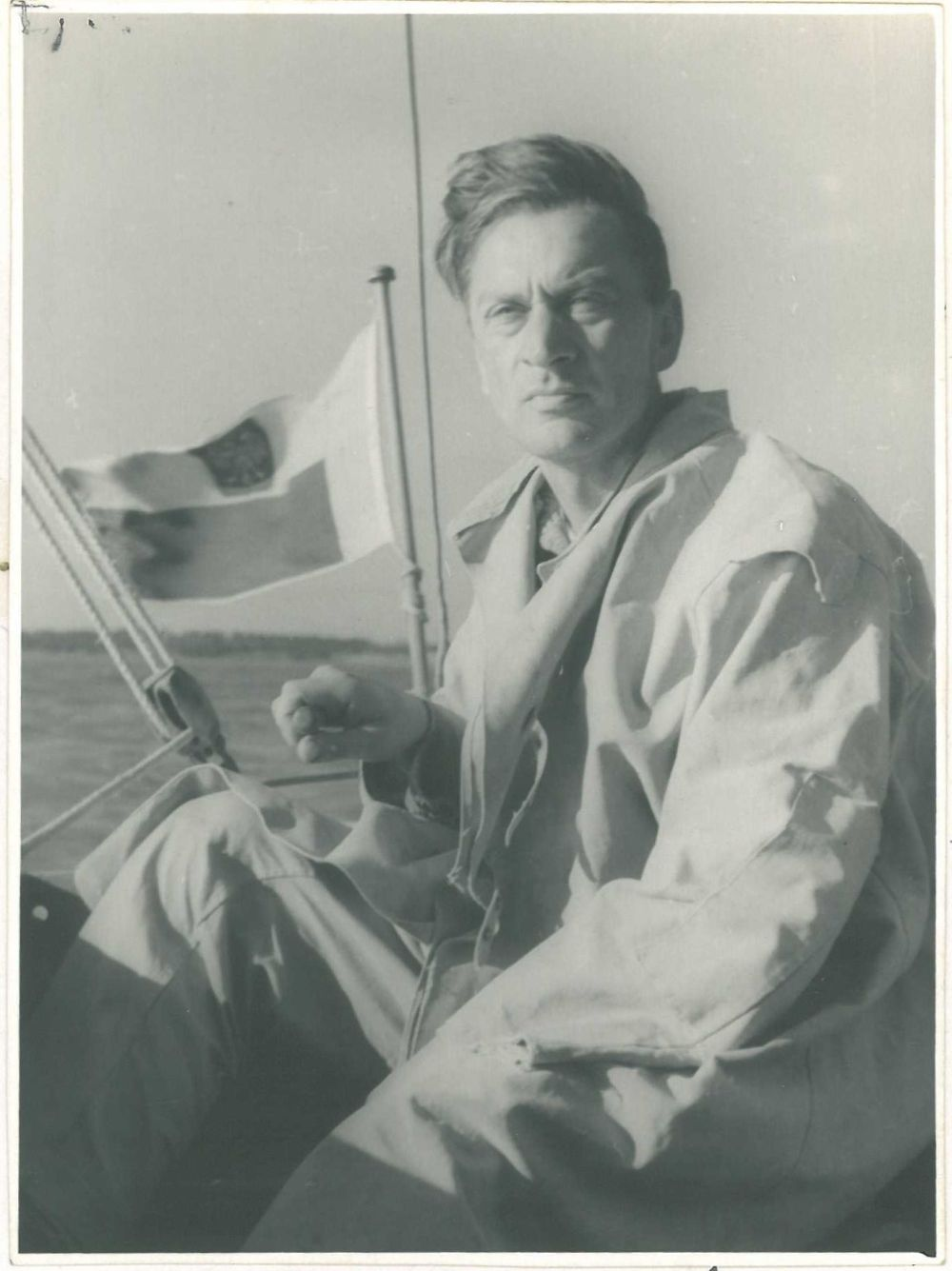 Wojciech Orszulok w 1955 roku na Zalewie Wiślanym.